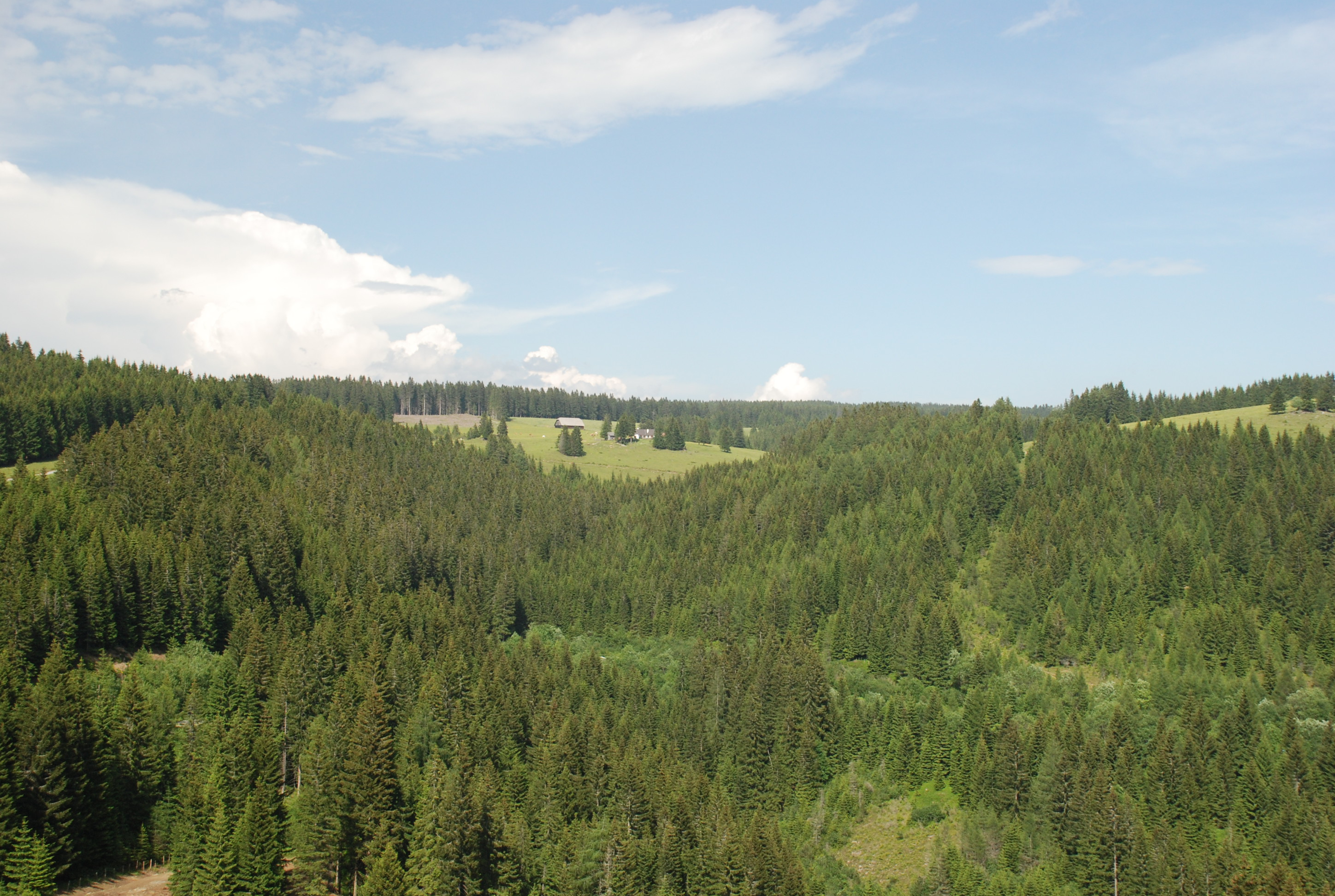 ehemaliges Almgebiet Hebalm